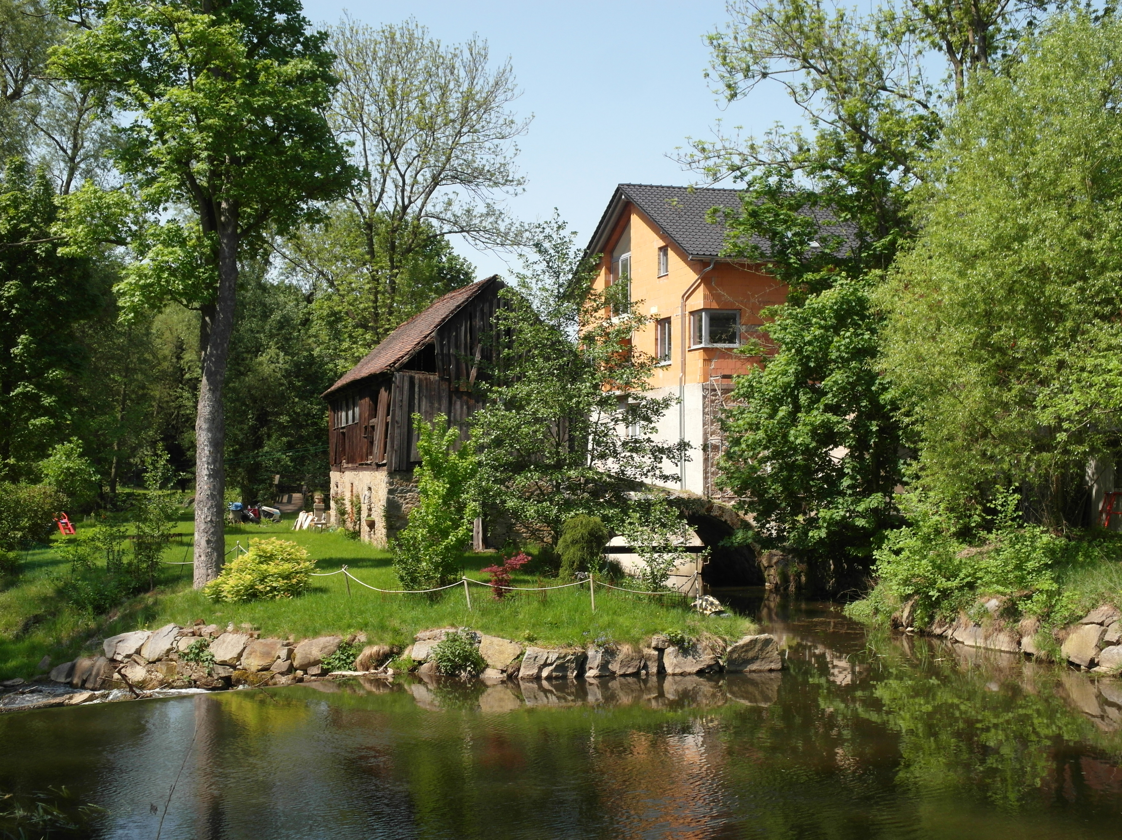 04.05.2018 01471 Großdittmannsdorf (Radeburg): Wassermühle in der Großen Röder, Bodener Straße 2 (GMP: 51.204843,13.764529). In einem Erbkaufkontrakt von 1780 erwirbt der Kaufmann Christian Gottfried Schmidt zu Schandau neben dem Rittergut Boden u.a. auch die Bodenische Mahl- und Schneidemühle. [SAM5854.JPG]20180504140DR.JPG(c)Blobelt